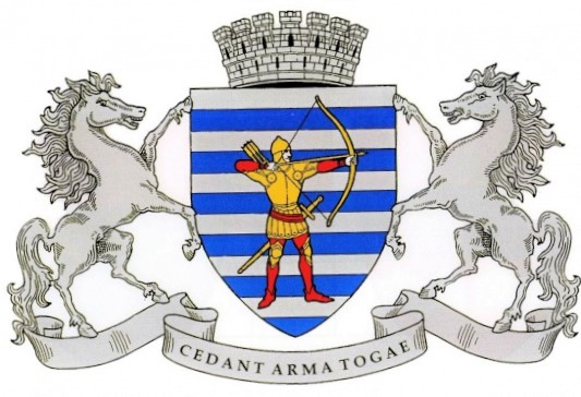 Coat of Arms of Bălţi, Moldova